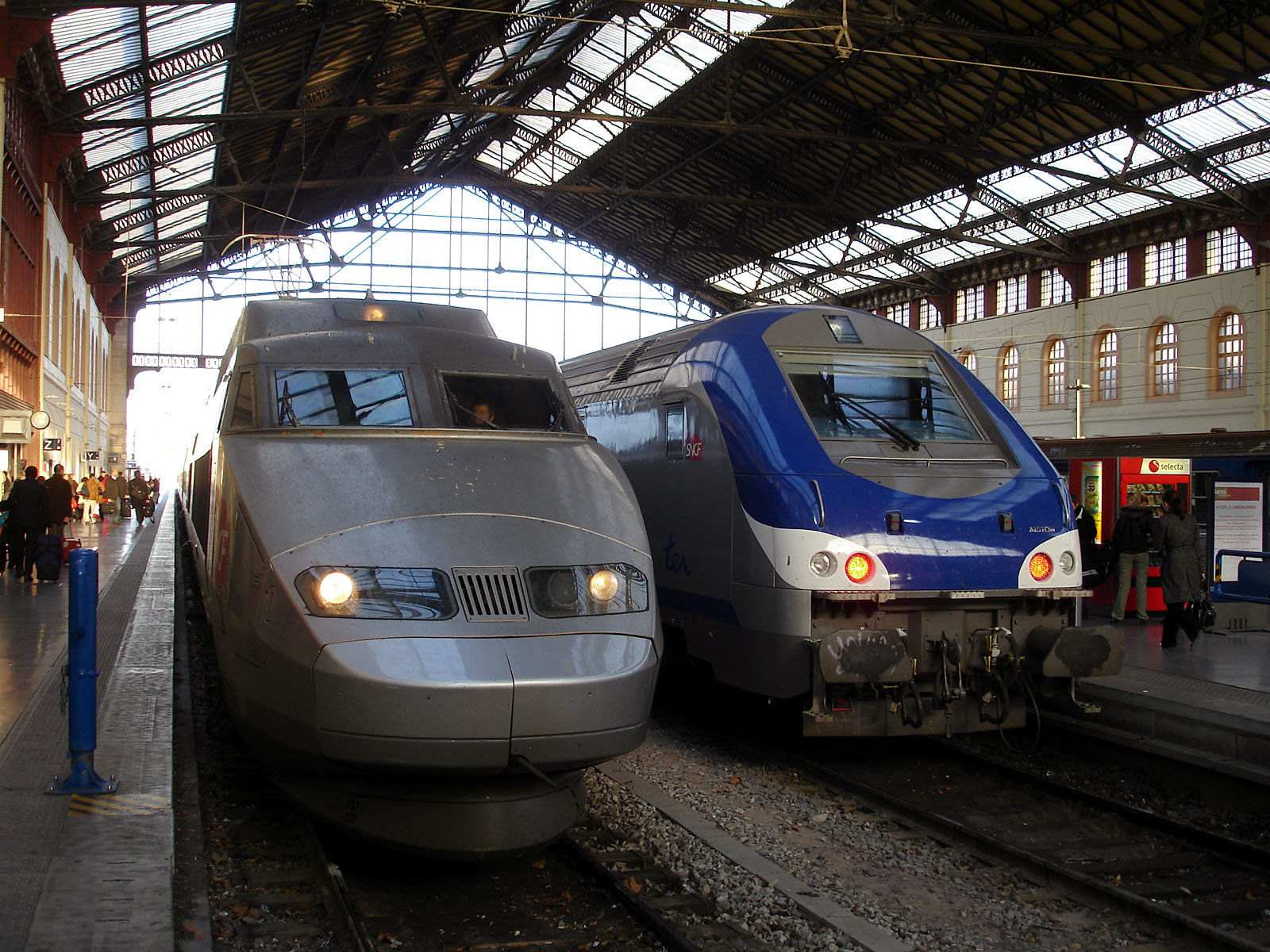 Rames TGV Sud-Est et Corail réversible B5uxh en gare de Marseille-Saint-Charles, France.